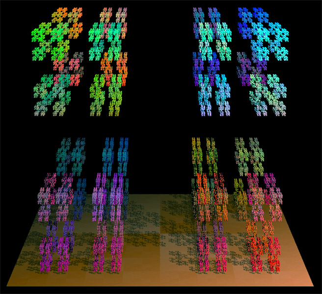 Cantorkub, en variant av fraktalen Cantordamm. För en beskrivning av tekniken som skapat bilden se: sv::Bild:Sierpinskipyramid.jpg. Andra bilder i samma serie: Linjära fraktaler i 3D: Bild:Sierpinskitetraed.jpg|right|thumb|Sierpinskitetraed Bild:Sierpinskipyramid.jpg|right|thumb|Sierpinskipyramid Bild:Mengers tvättsvamp (Fraktal).jpg|right|thumb|Mengers tvättsvamp Kategori:Bilder av fraktaler